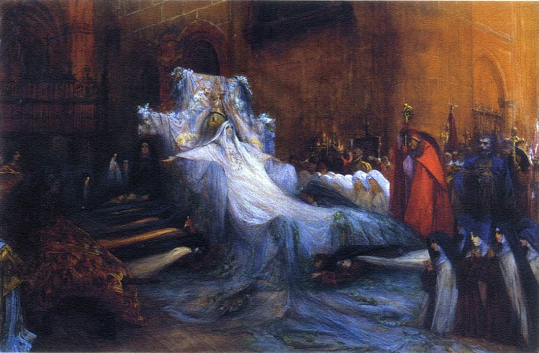 Sarah Bernhardt (1844-1923) in Sainte Therese d'Avila.